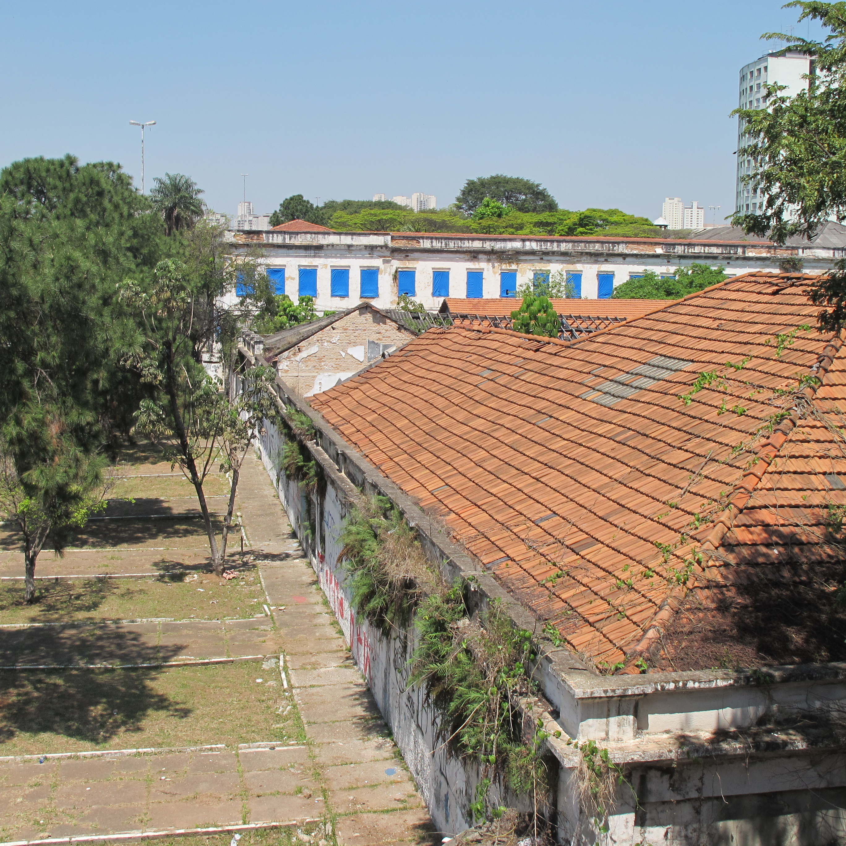 Quartel do Segundo Batalhão de Guardas vista da rampa de acesso a estação de metrô Pedro II em São Paulo, SP, Brasil.